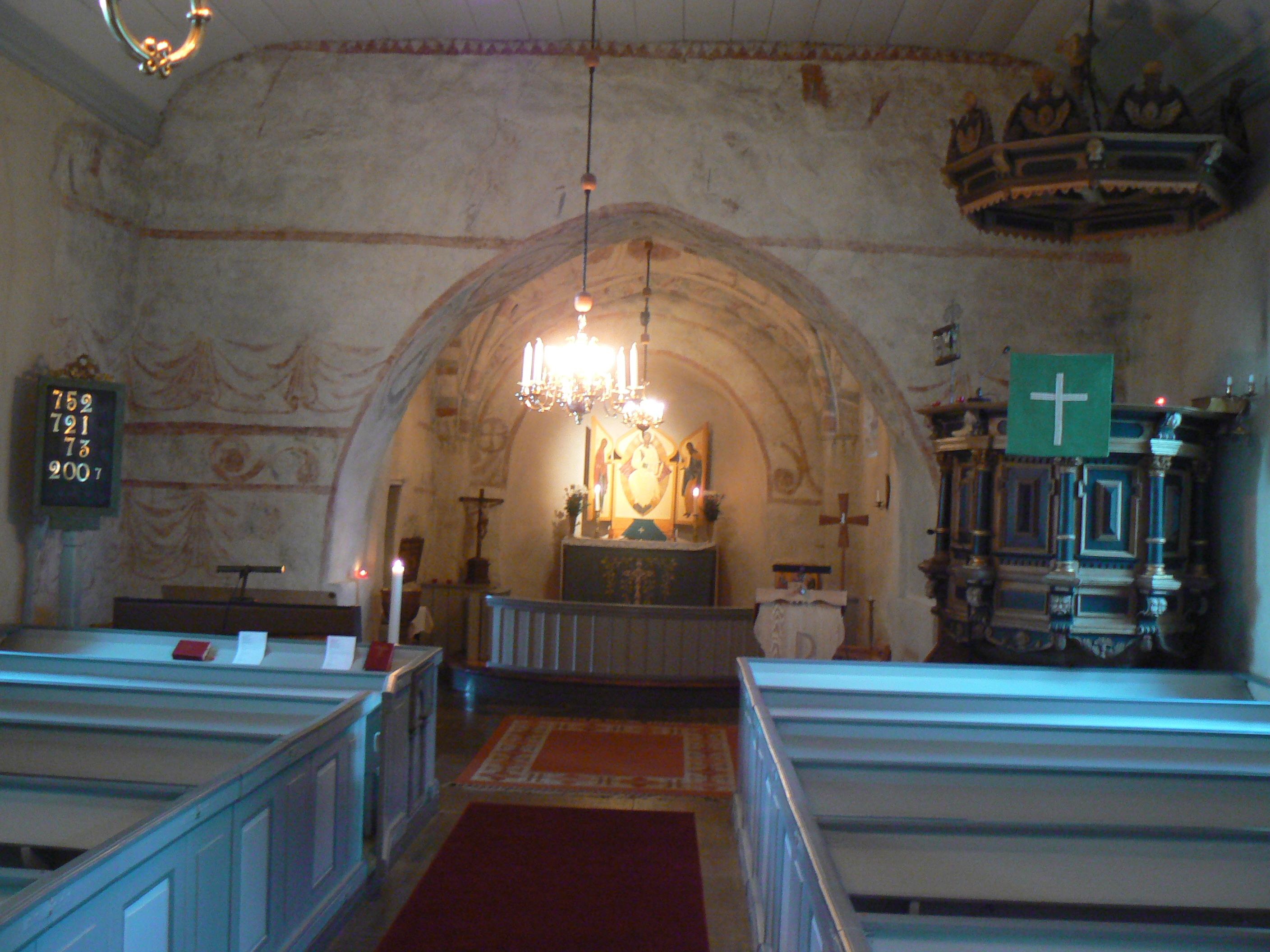 Interior of Björkeberg Church west of Linköping, Sweden.